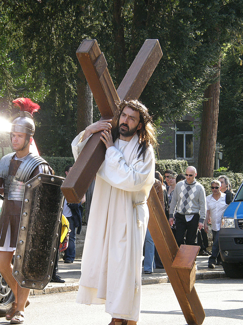 Bilder aus Stuttgart